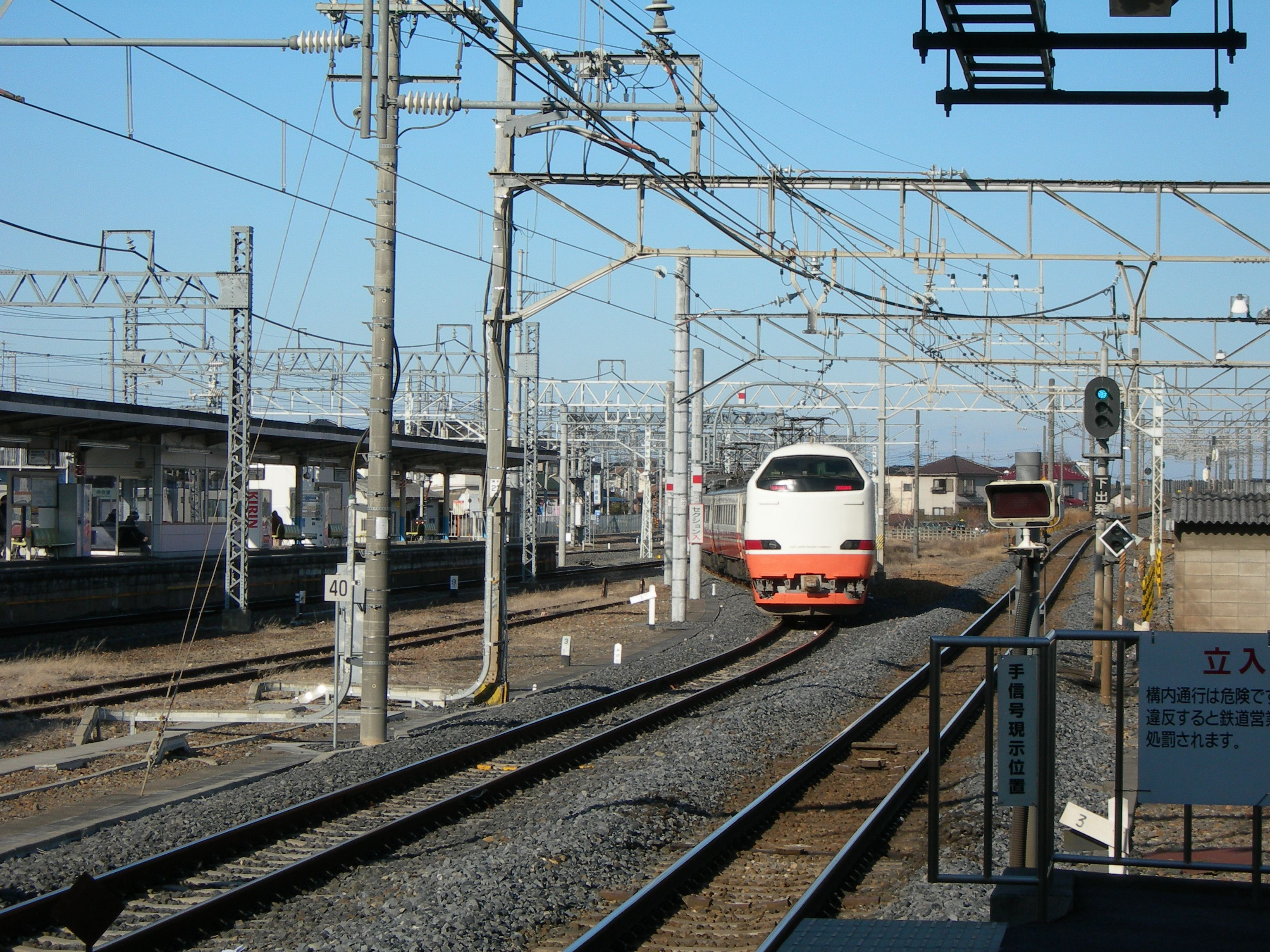 栗橋駅の連絡線を通過中の４８５系